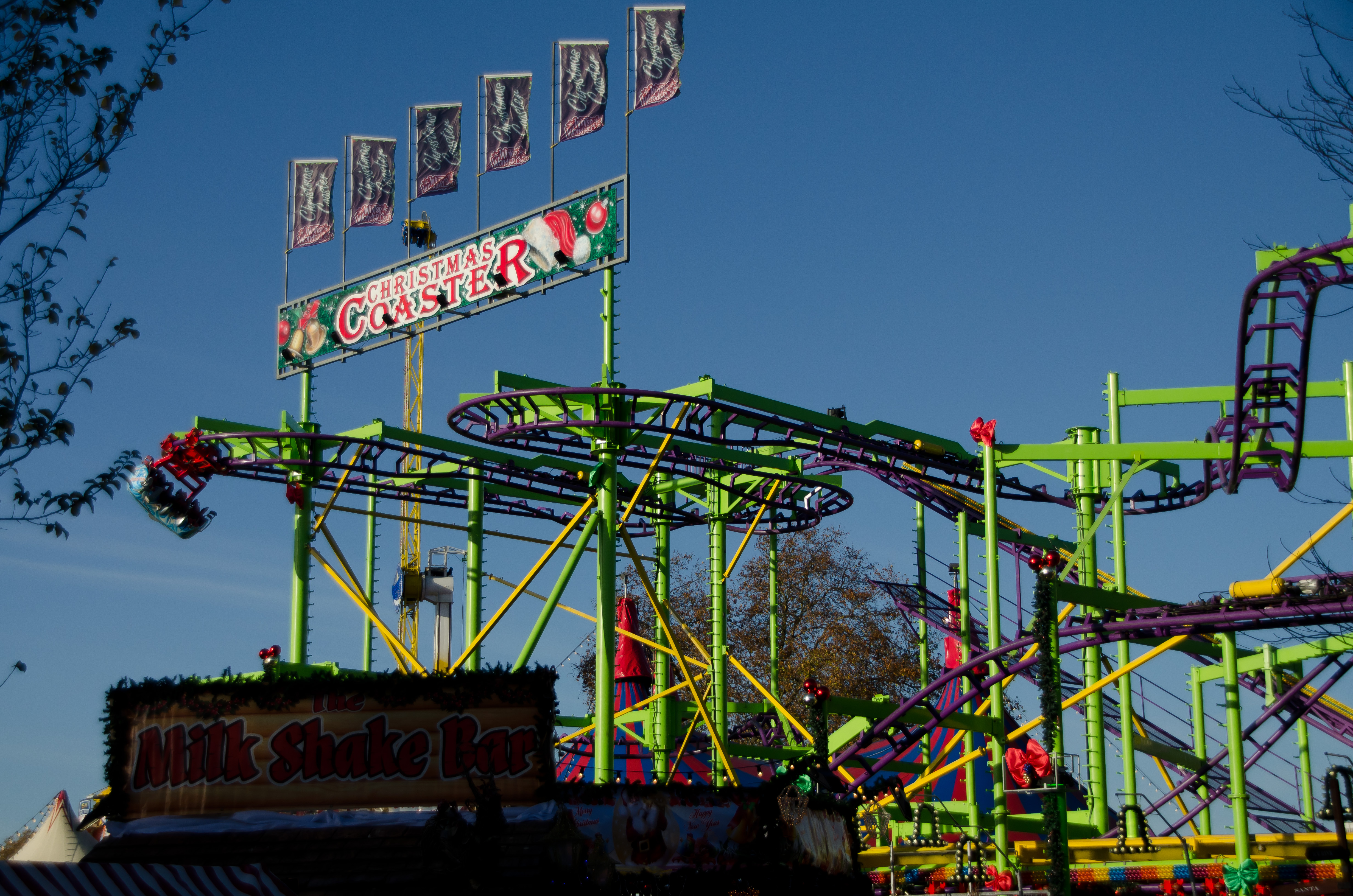 Photos taken at Winter Wonderland in Hyde Park, London, in 2011.